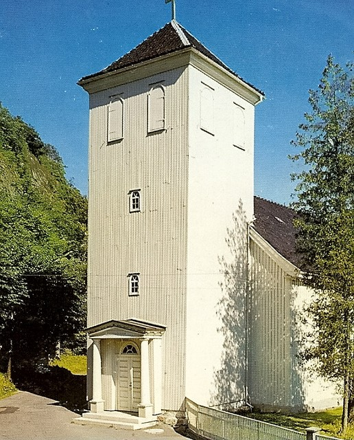 Holmestrand kirke